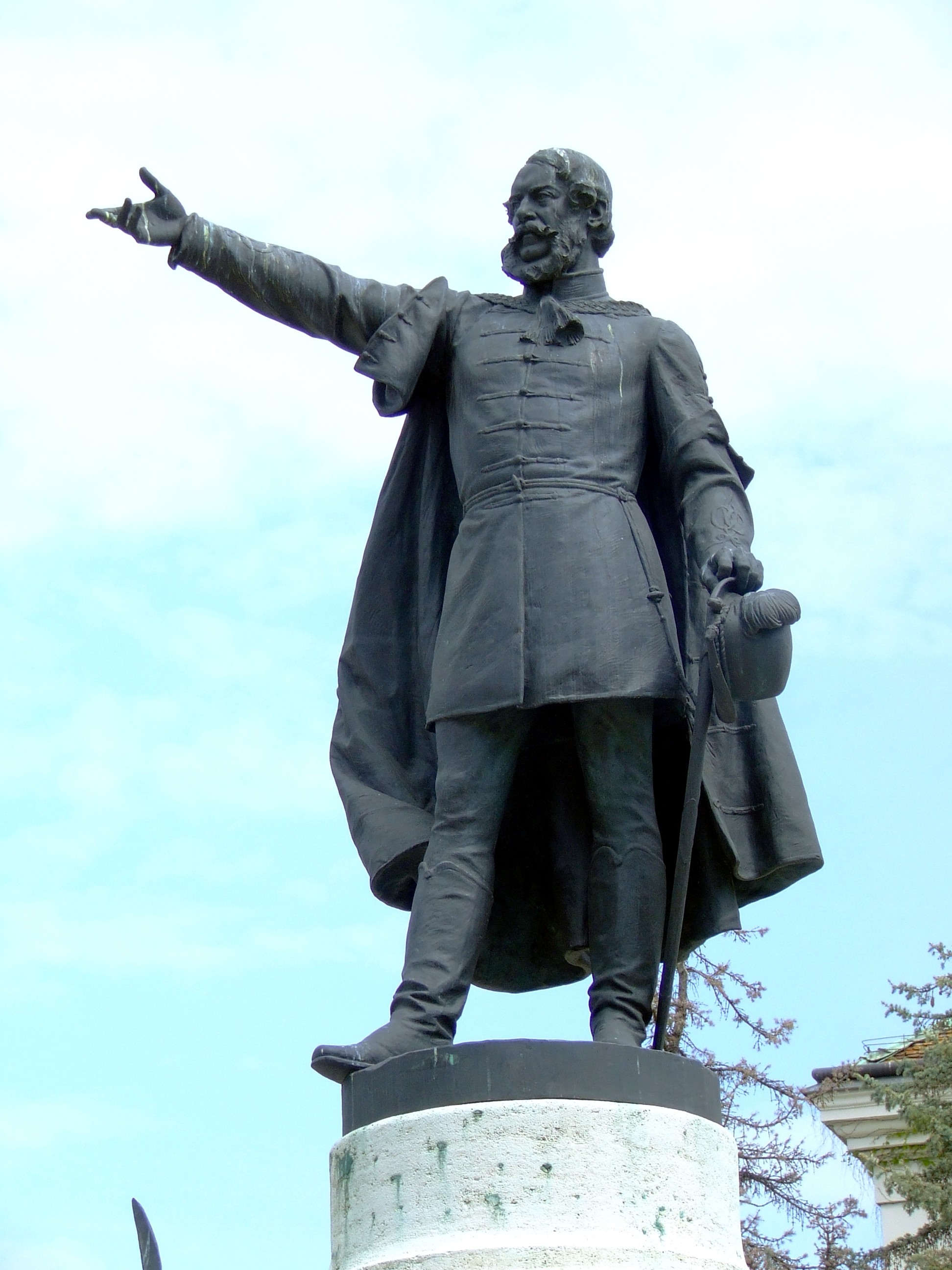 Kossuth Lajos szobra Kecskeméten (részlet). Telcs Ede szobrászművész alkotása (1906)